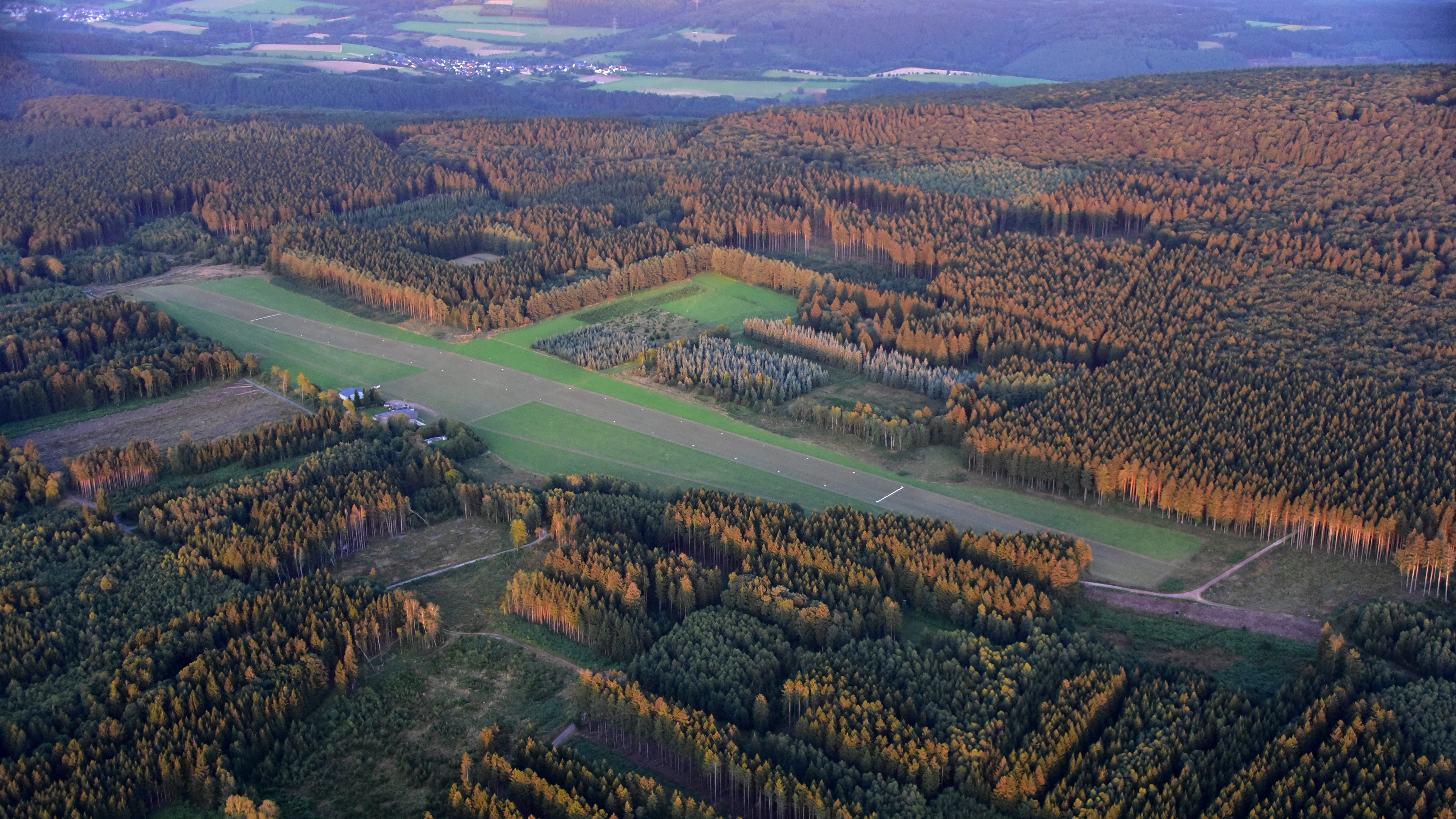 Flugplatz Kell am See, Luftaufnahme (2016)